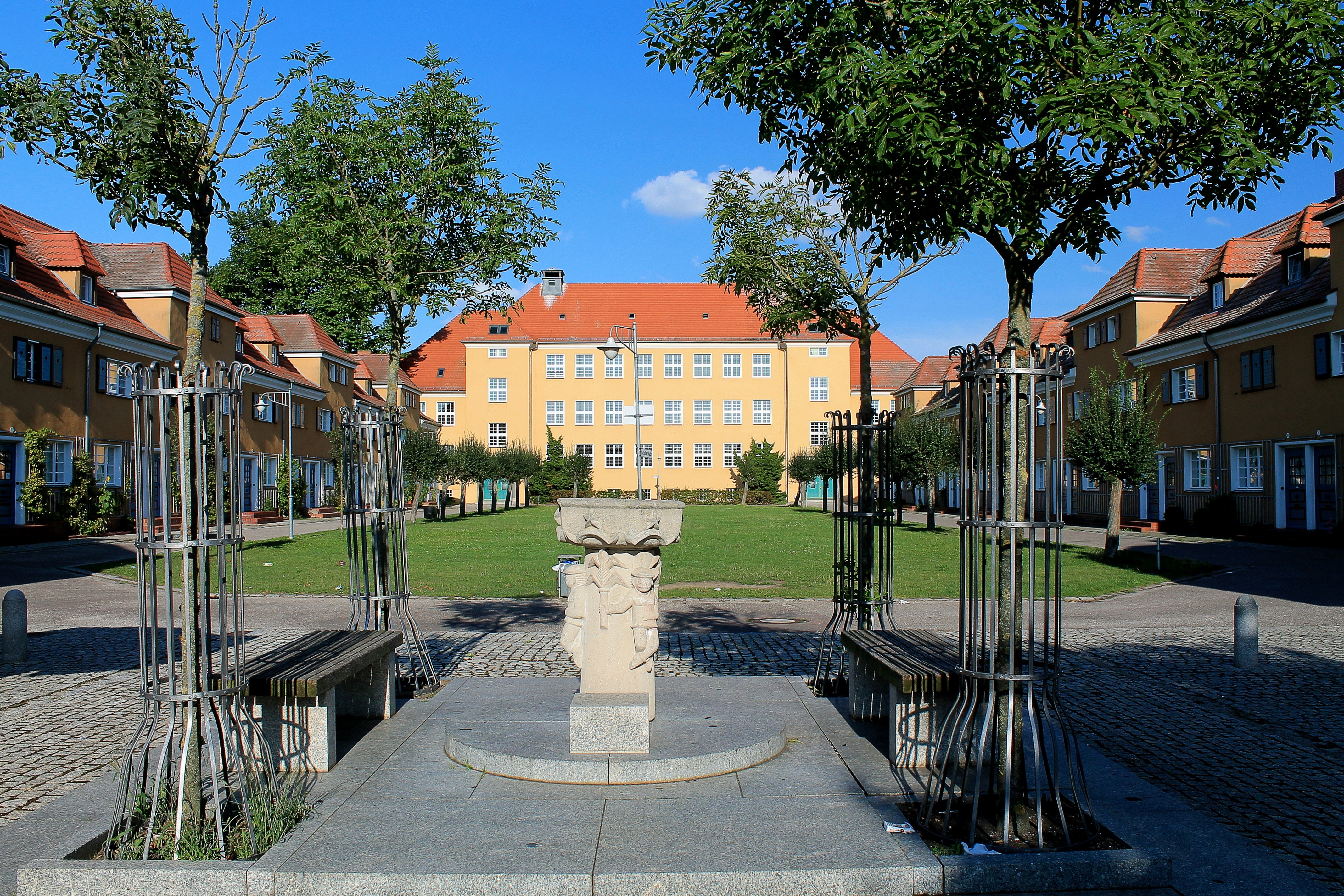 Gartenstadtsiedlung im Baustil aus dem Anfang des 20. Jahrhunderts.